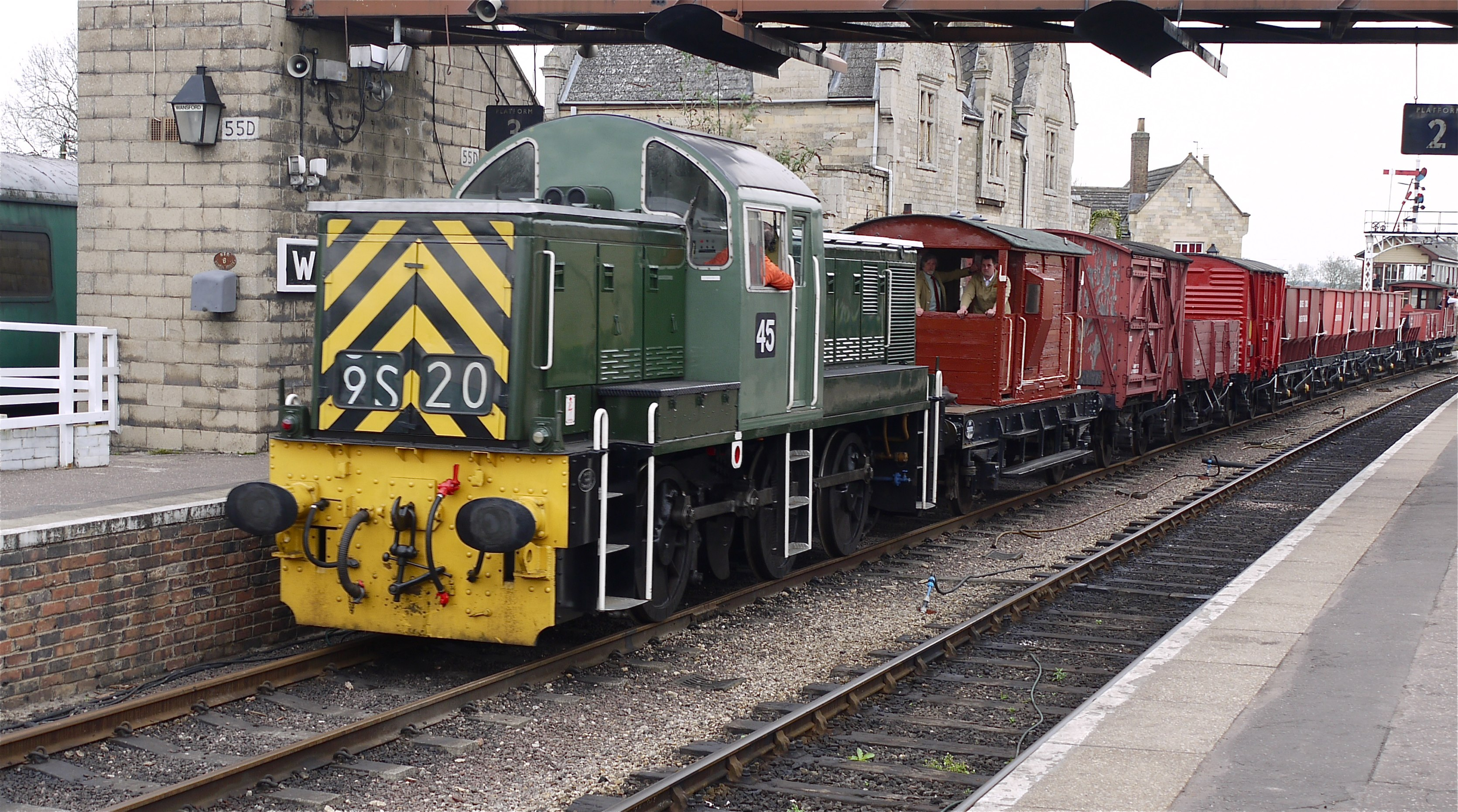 Panasonic G1 14-45 Lens